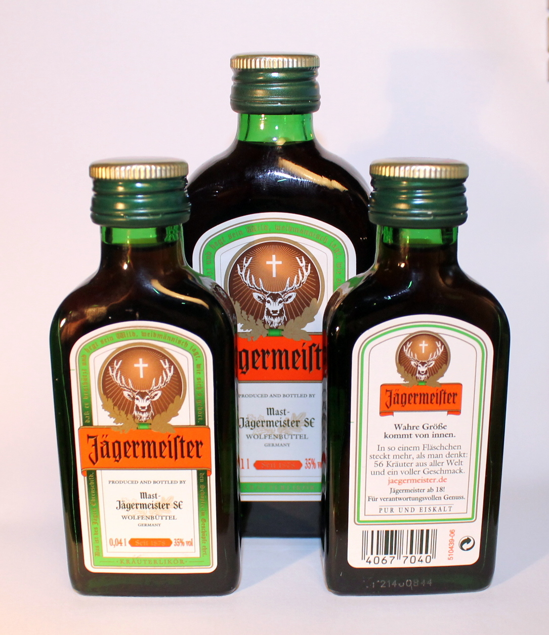 3 flasker Jägermeister